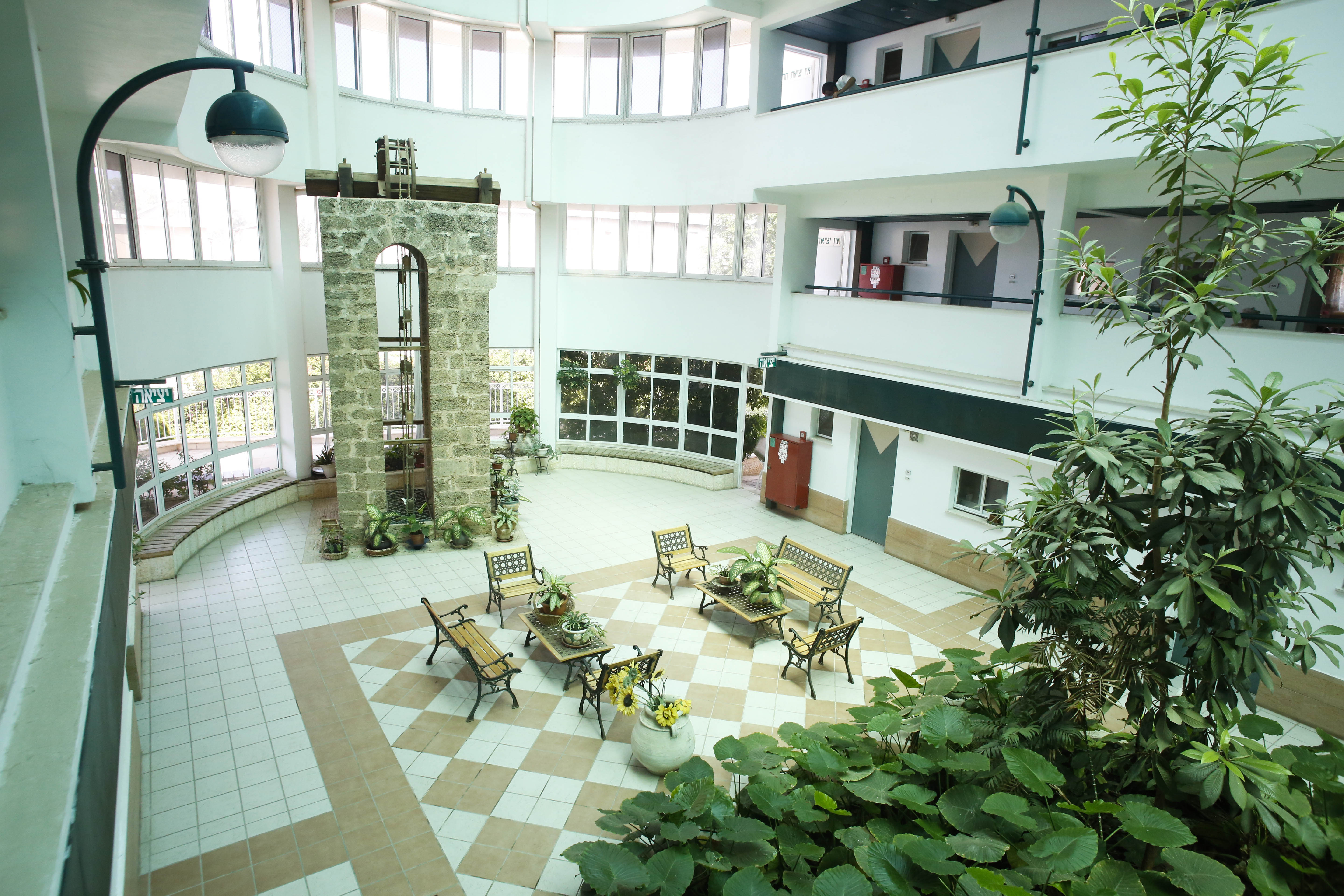 בית גיל הזהב "גלעד" בנהריה